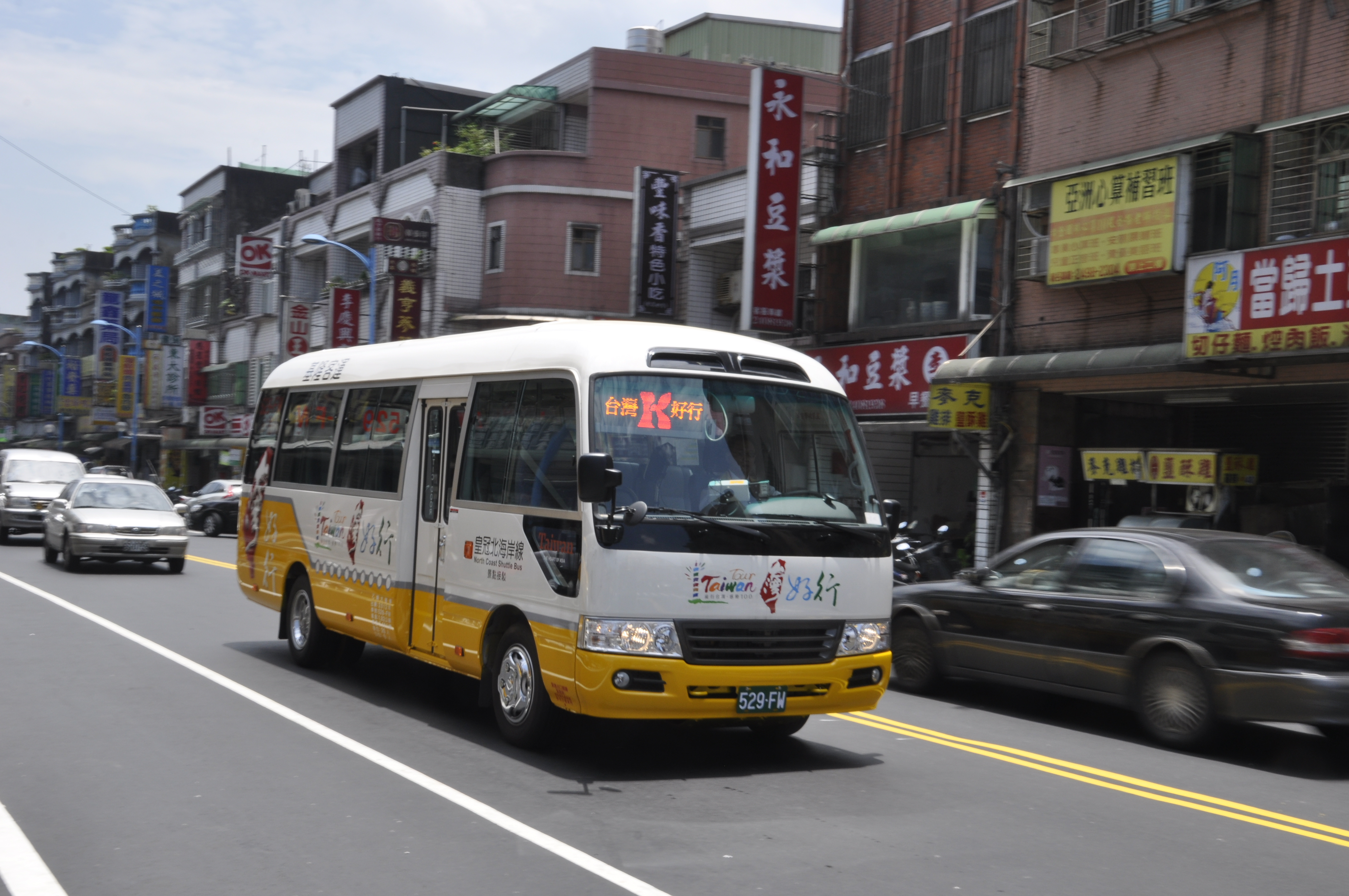 基隆客運豐田Coaster中型巴士529-FW，行駛台灣好行862皇冠北海岸線。